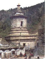 Foto: Andreas Gruschke, Freiburg